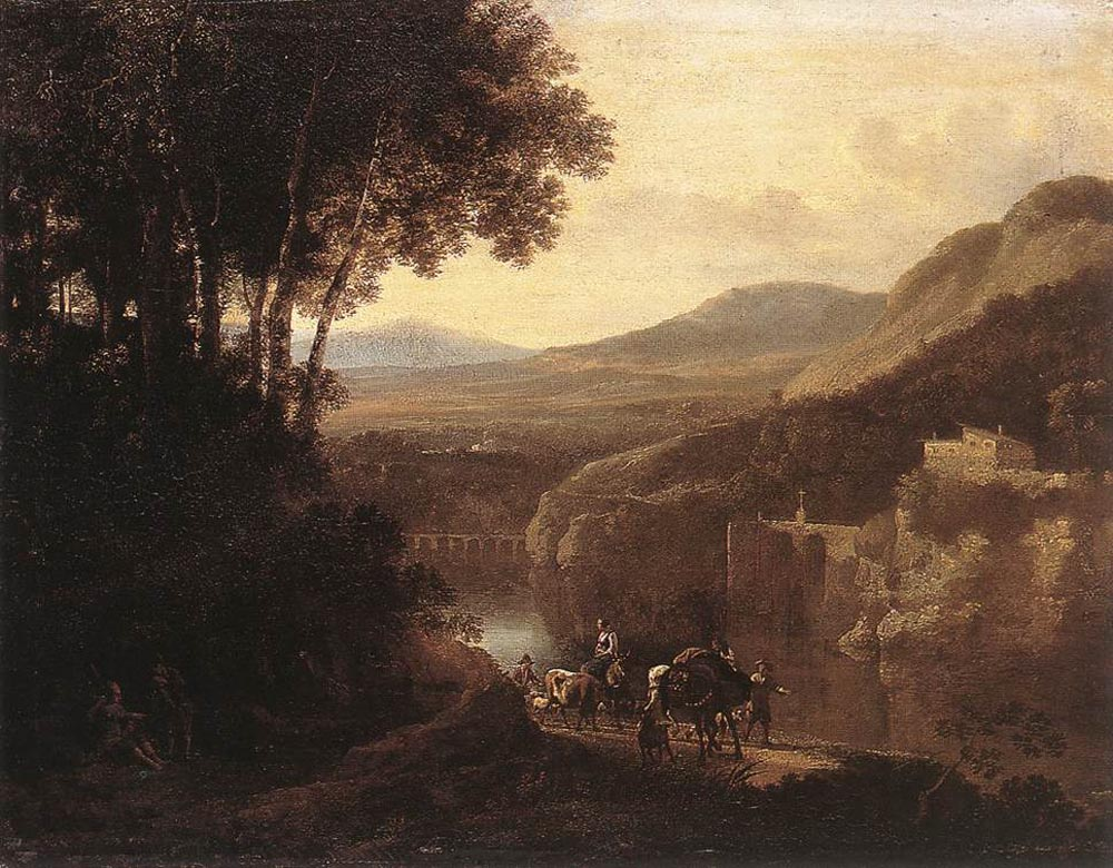 River Scene